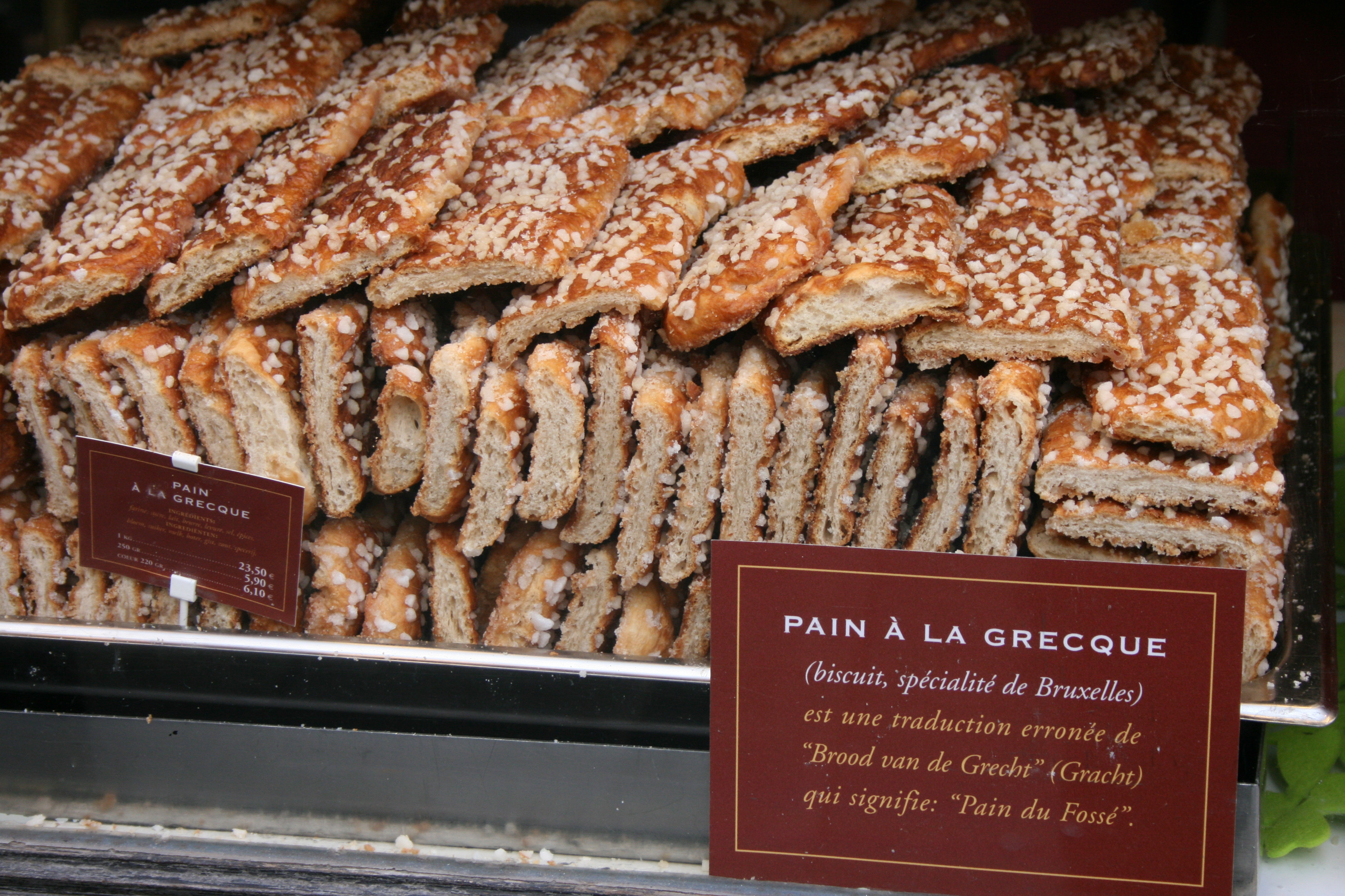 Brussels delicacy called «pain à la grecque», litteraly «Greek bread». Maison Dandoy, 31 rue au Beurre, Brussels